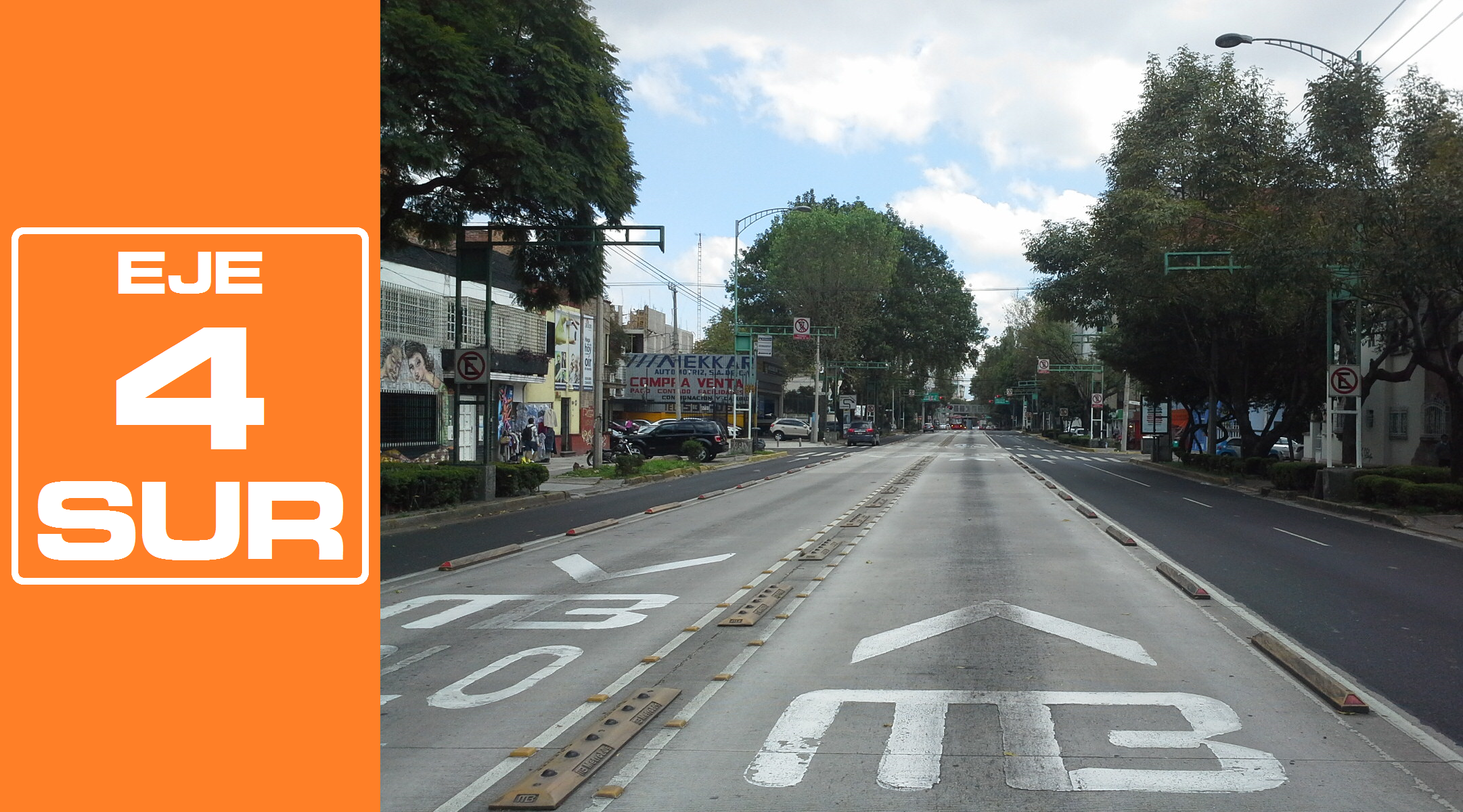 Rediseñado original de la señalética de los Ejes viales de la Ciudad de México por José García (Wiki ID: narumiyama)